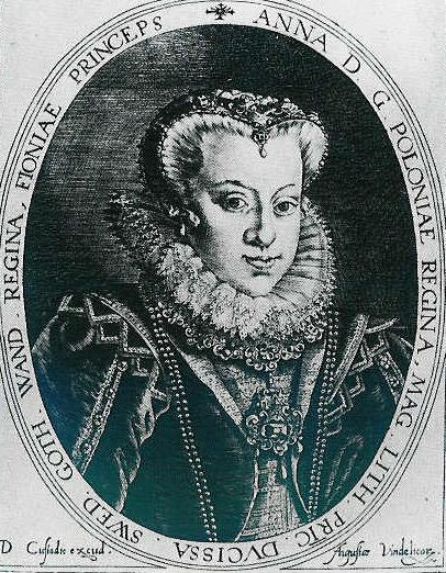 Anna Austriaczka